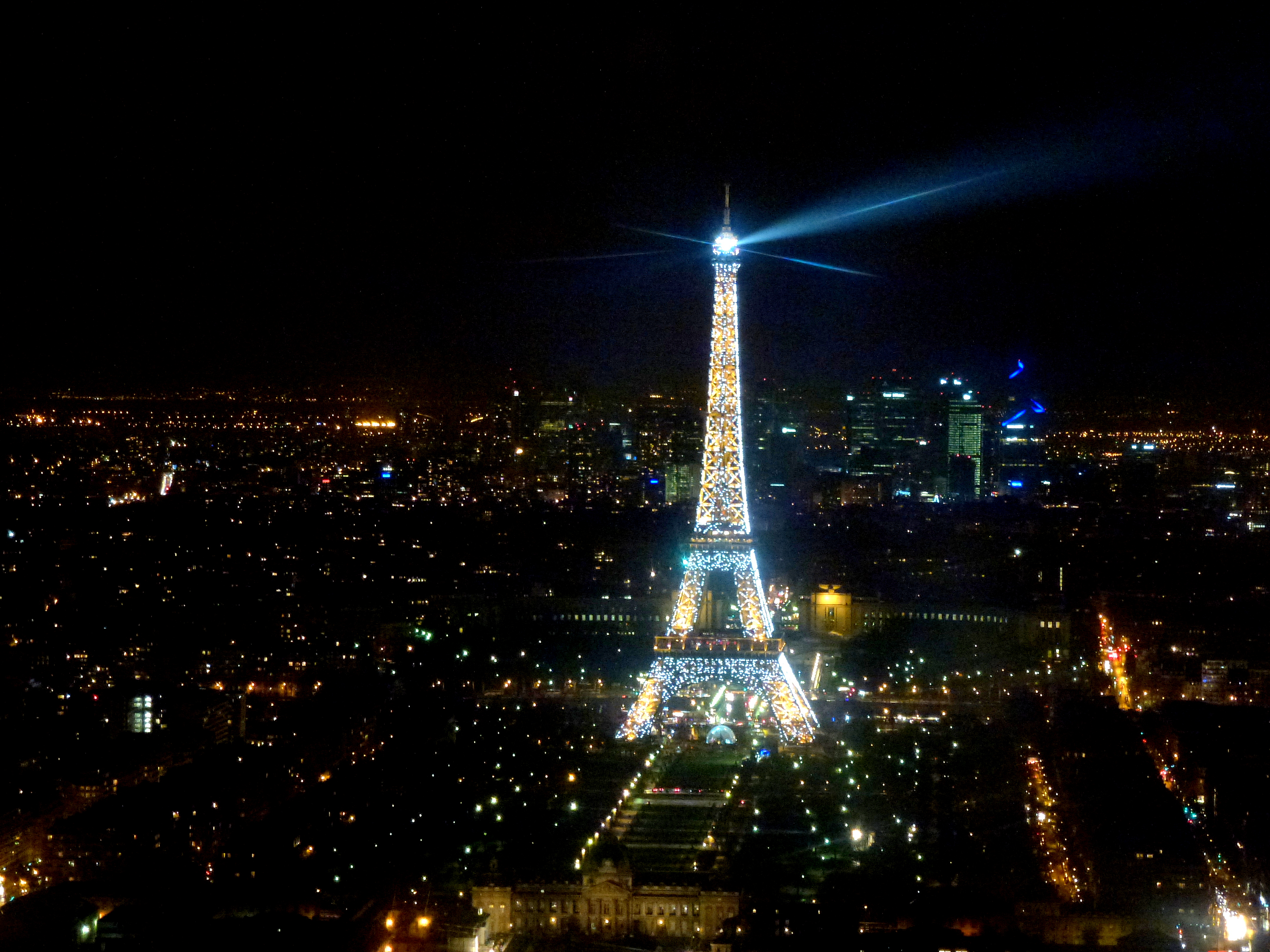 Blick vom Restaurant Ciel de Paris auf das Lichtermeer von Paris und den Eiffelturm. Seit 2003 erstrahlt er wie ein Brillant zu jeder vollen Stunde für 5 Minuten von der Dämmerung bis 1 Uhr morgens